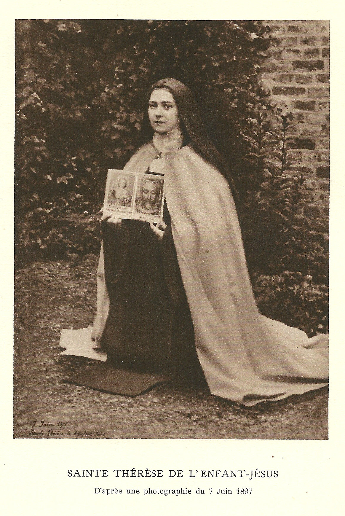 Gravure de "Sainte Thérèse de l'Enfant Jésus, Histoire d'une âme écrite par elle-même, Lisieux, Office central de Lisieux (Calvados), & Bar-le-Duc, Imprimerie Saint-Paul, 1937, édition 1940."